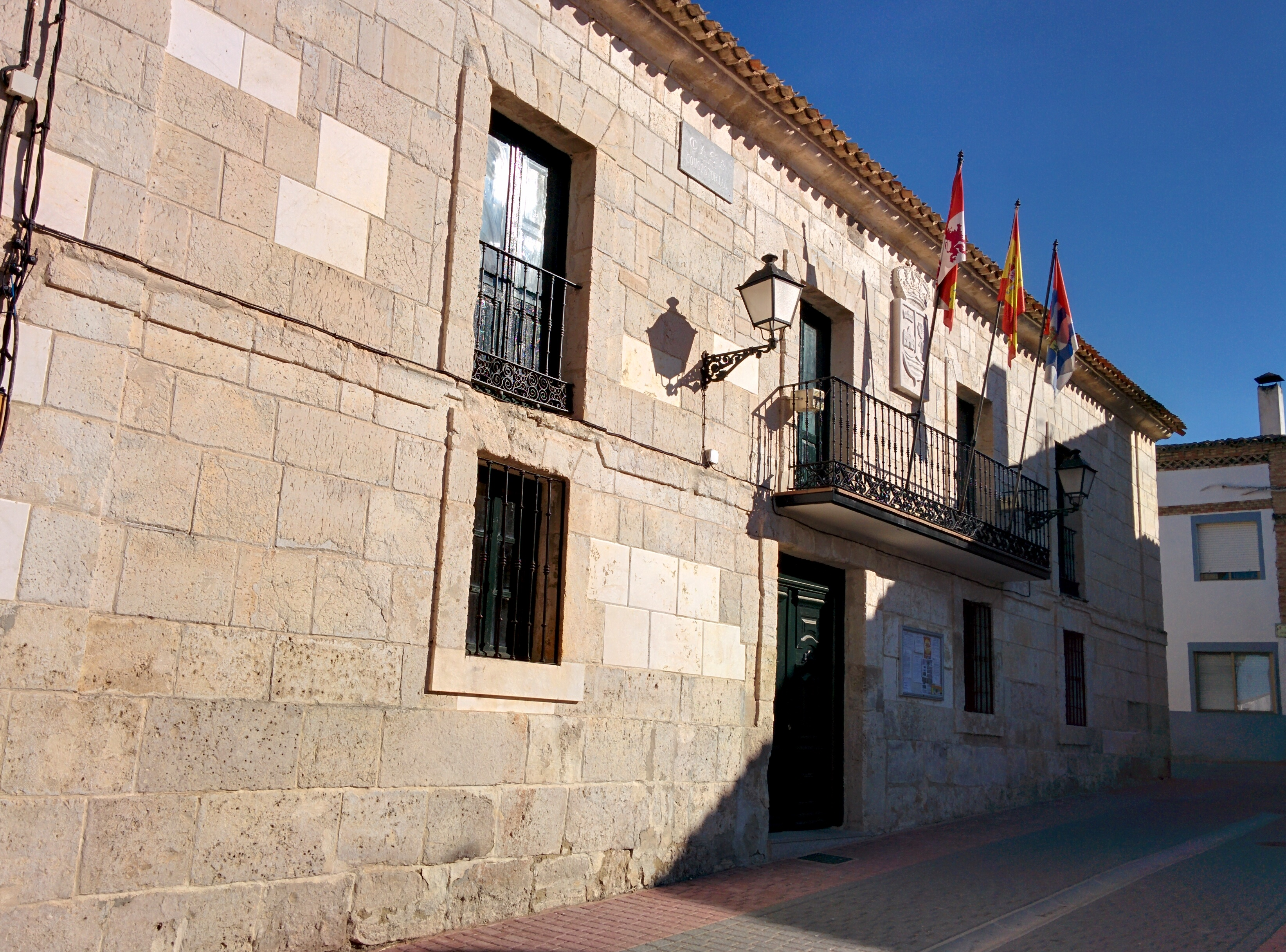 Casa consistorial de Villaviudas (Palencia, España).